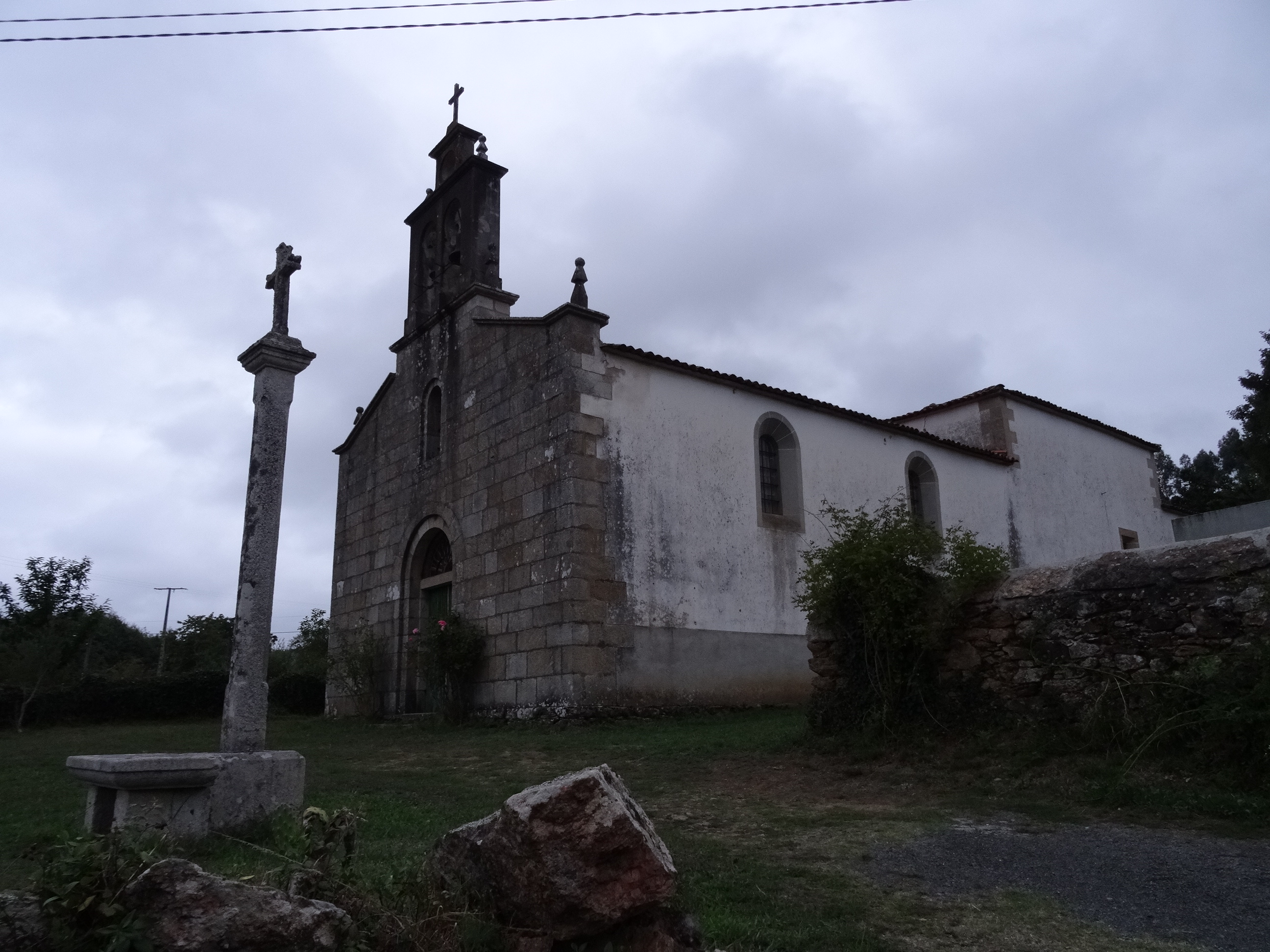 Igrexa da parroquia de Niñodaguia no concello de Santiso, provincia da Coruña.